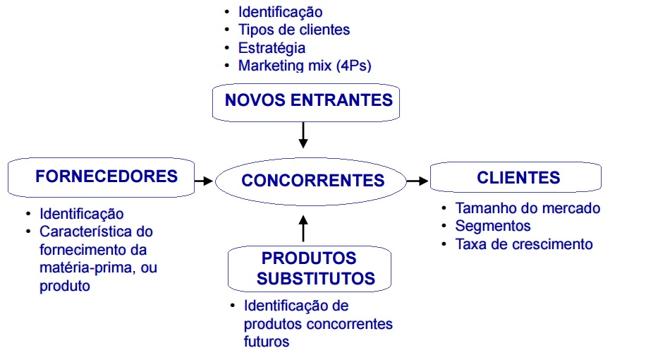 Esquema ilustrando as forças competitivas de Porter.